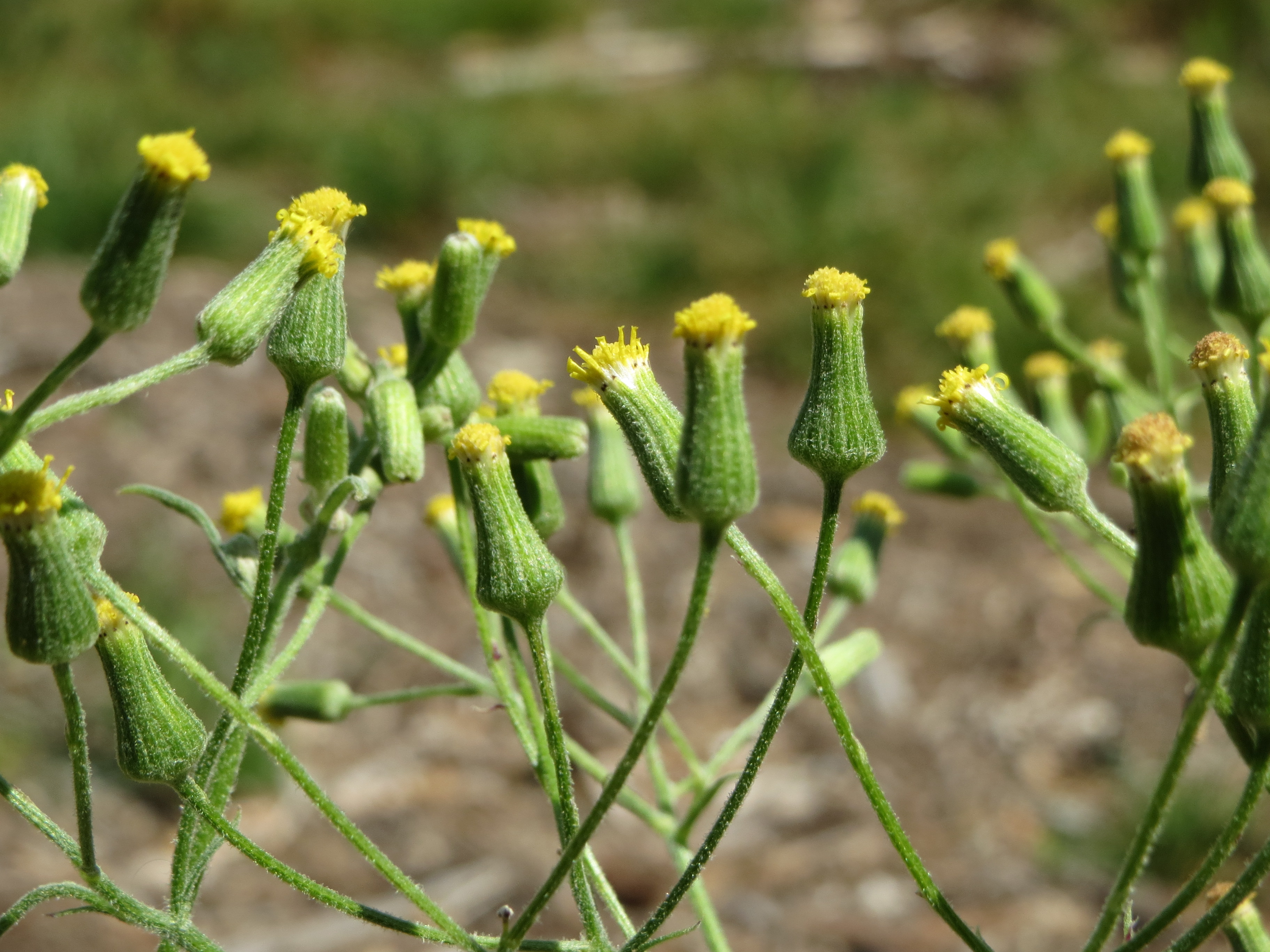 Wald-Greiskraut (Senecio sylvaticus) im Schwetzinger Hardt